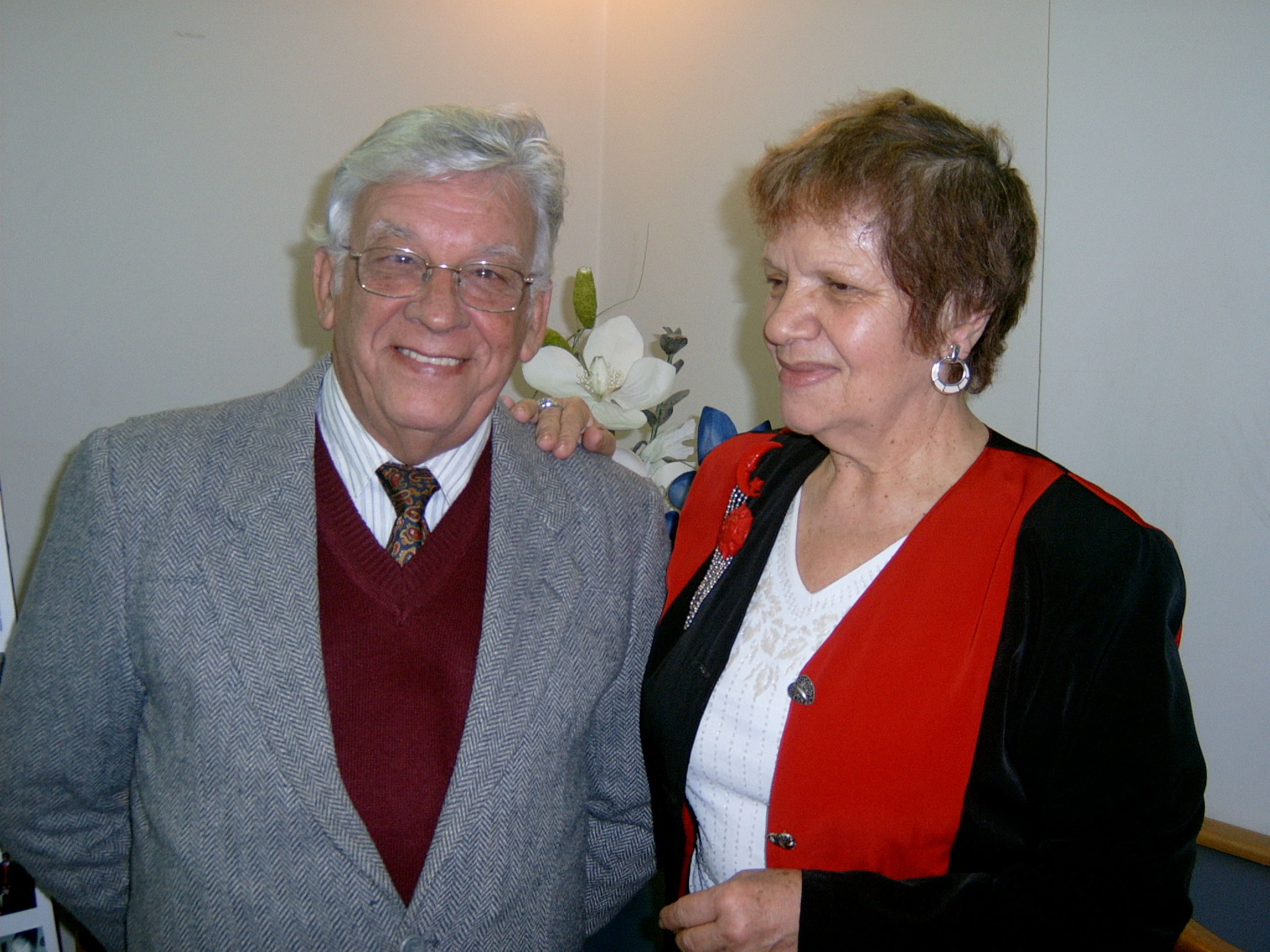 Escritor Alcione Sortica e Poetisa/Radialista Perpétua Flores, recepção em Porto Alegre, 2007.